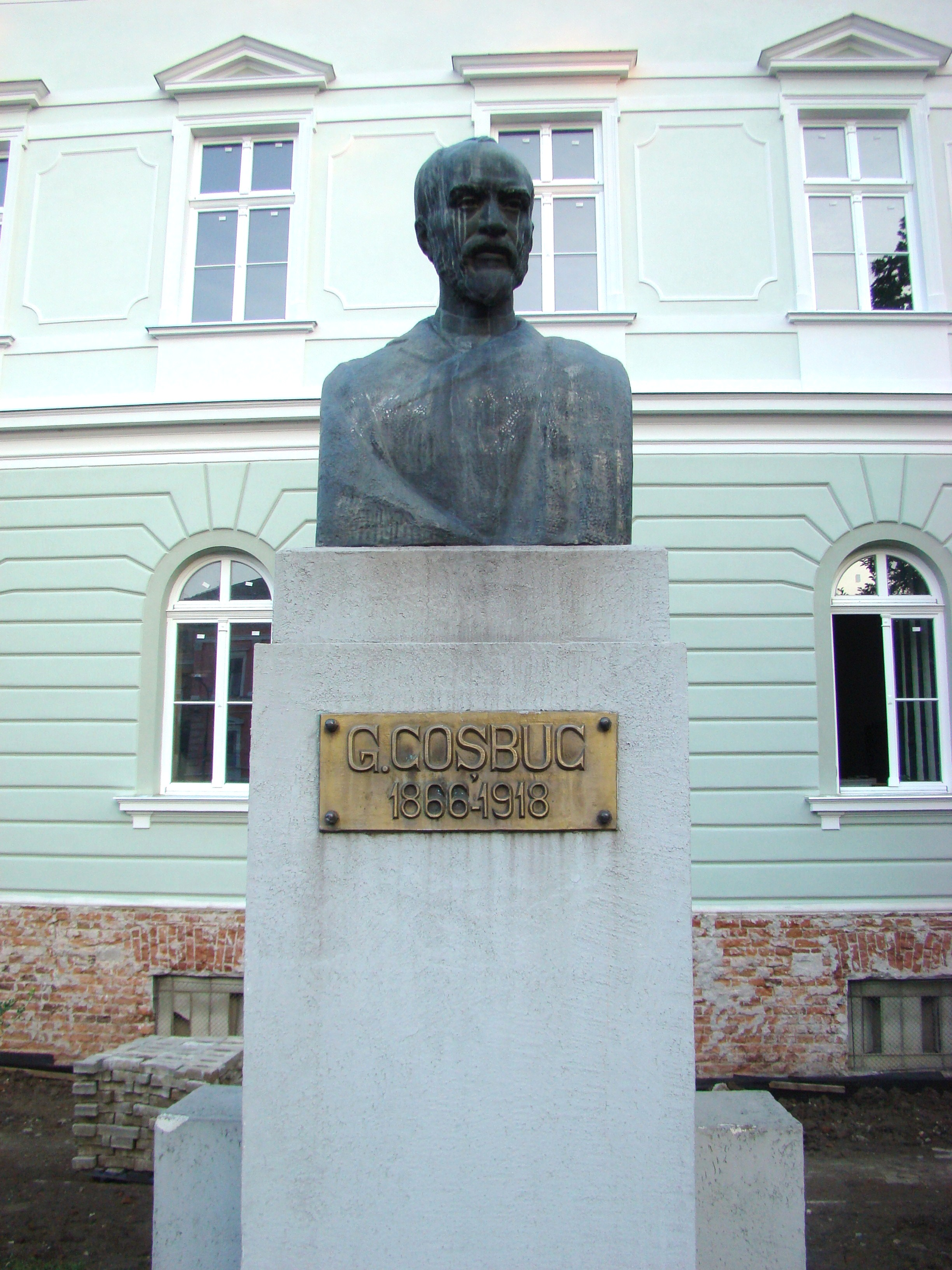 Bustul lui George Coșbuc din Sibiu